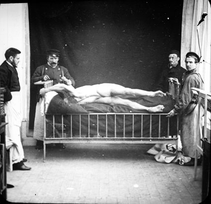 Fonds Trutat - Photographie ancienne Cote : TRU C 1329 Localisation : Fonds ancien (S 30) Original non communicable Titre : Attaque d'hystérie, homme Auteur : Albert Londe (?) Rôle de l’auteur : Photographe Lieu de création : Non identifié Date de création : 1859-1910 [entre] Mesures : : 12 x 9 cm Observations : Cette plaque n'est surement pas de Trutat mais ferait partie de sa collection de plaques de projection destinées à ses cours Mot(s)-clé(s) : -- Homme -- Nudité -- Hôpital -- Folie -- Lit -- Costume masculin -- Fenêtre -- Chambre -- Rideau -- Non identifié -- 19e siècle, 2e moitié -- 20e siècle, 1e quart Médium : Photographies -- Négatifs sur plaque de verre -- Noir et blanc -- Portraits Bibliothèque de Toulouse. Domaine public